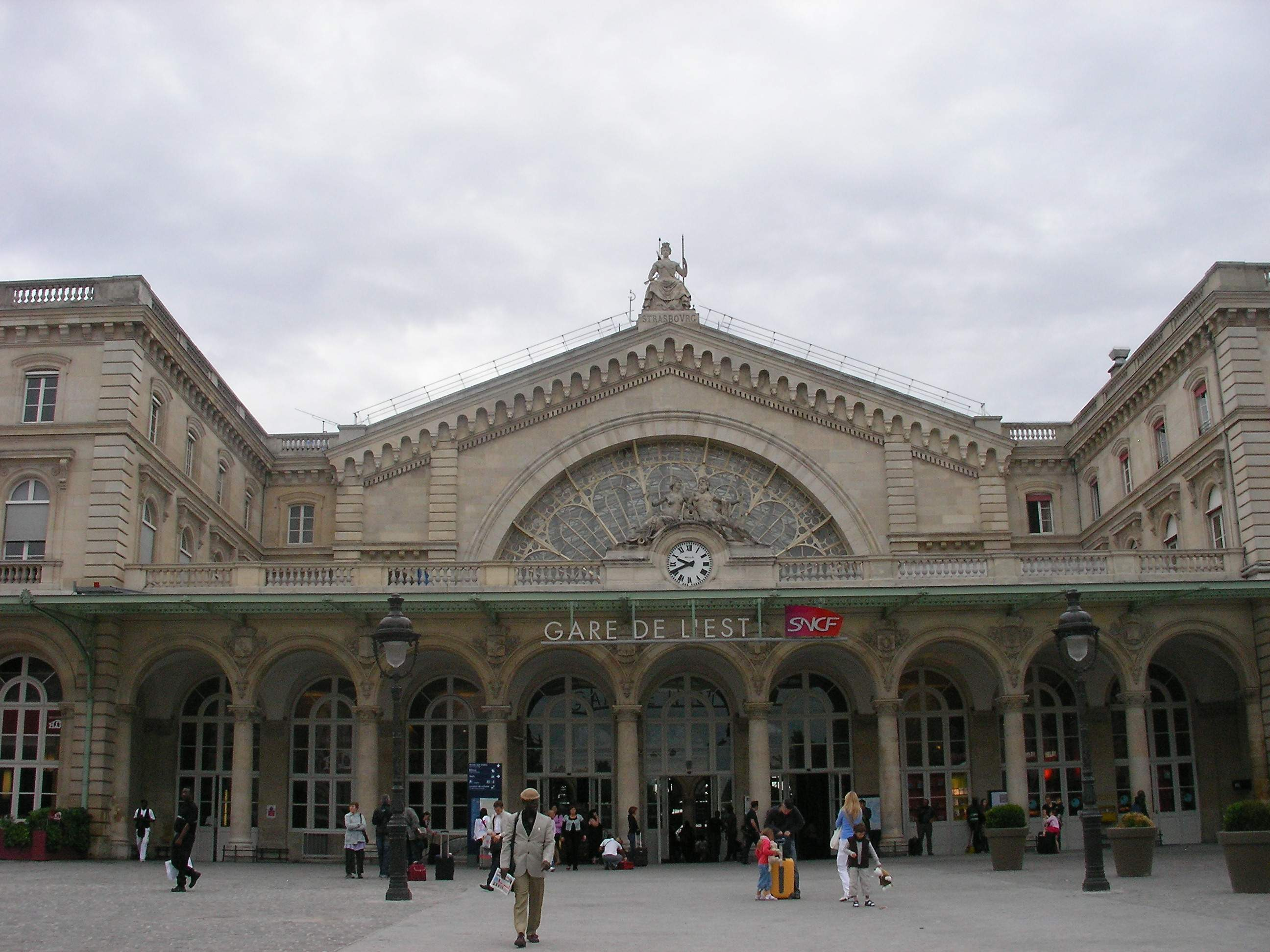 Gare de l'Est à Paris (Île-de-France, France).